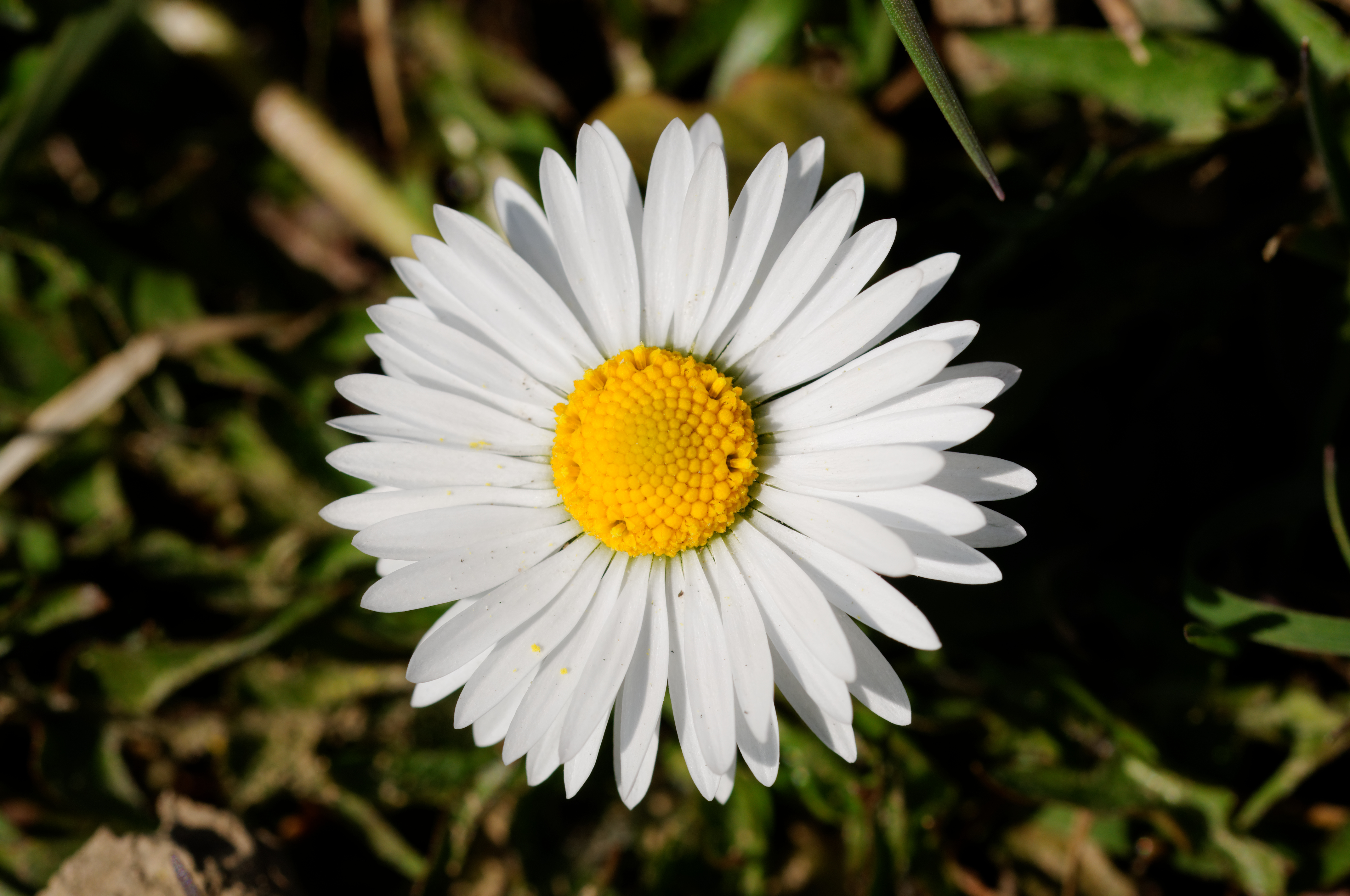 Pâquerette (Bellis perennis).